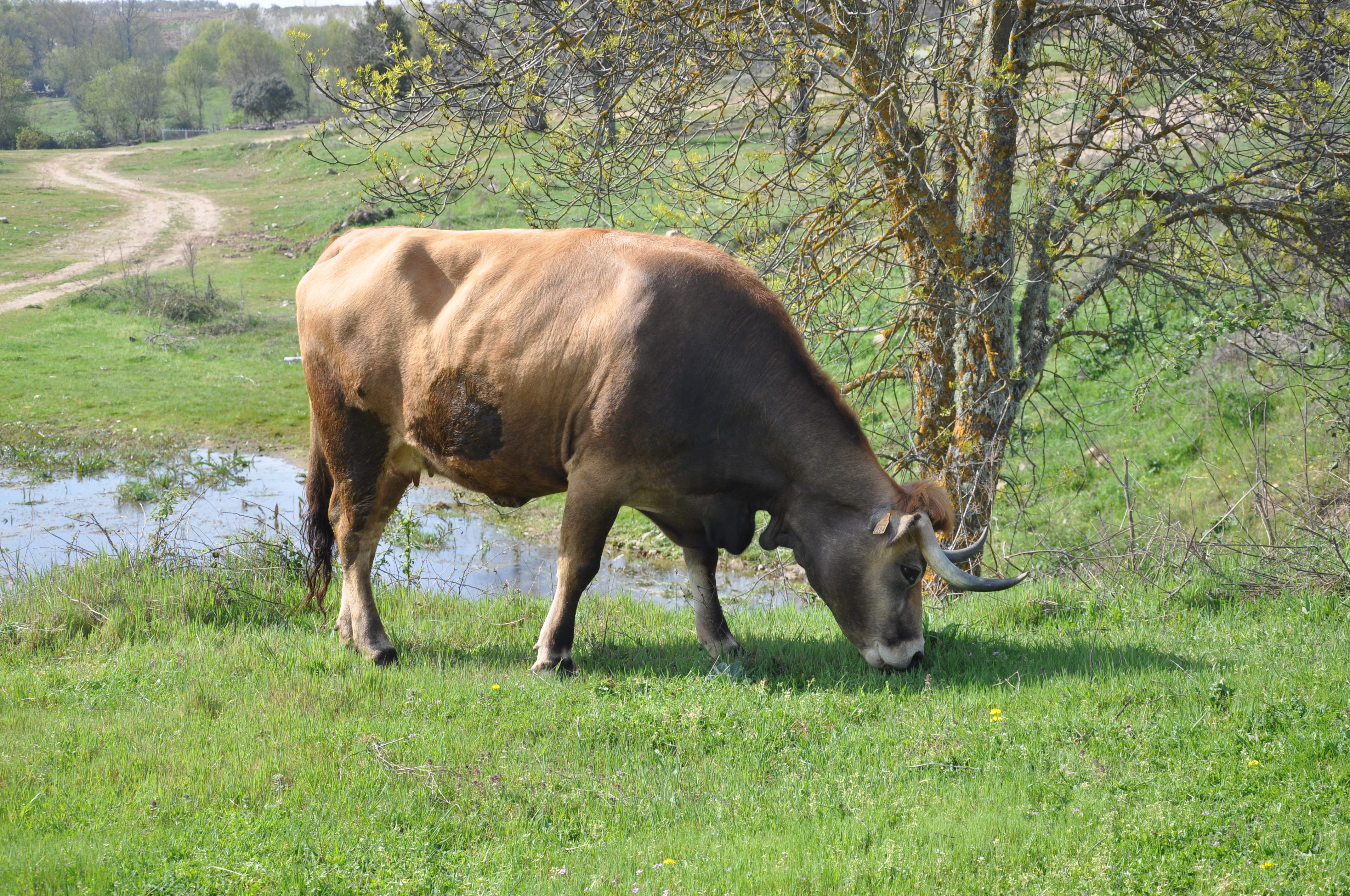 Vaca mirandesa, Cércio, Portugal.